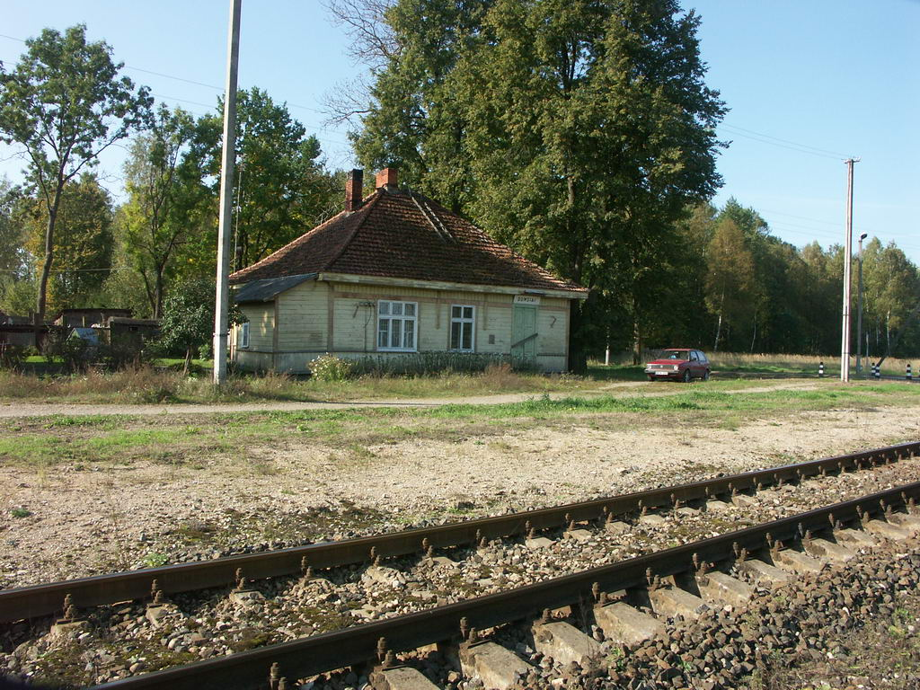 dumsiu gelezinkelio stotis